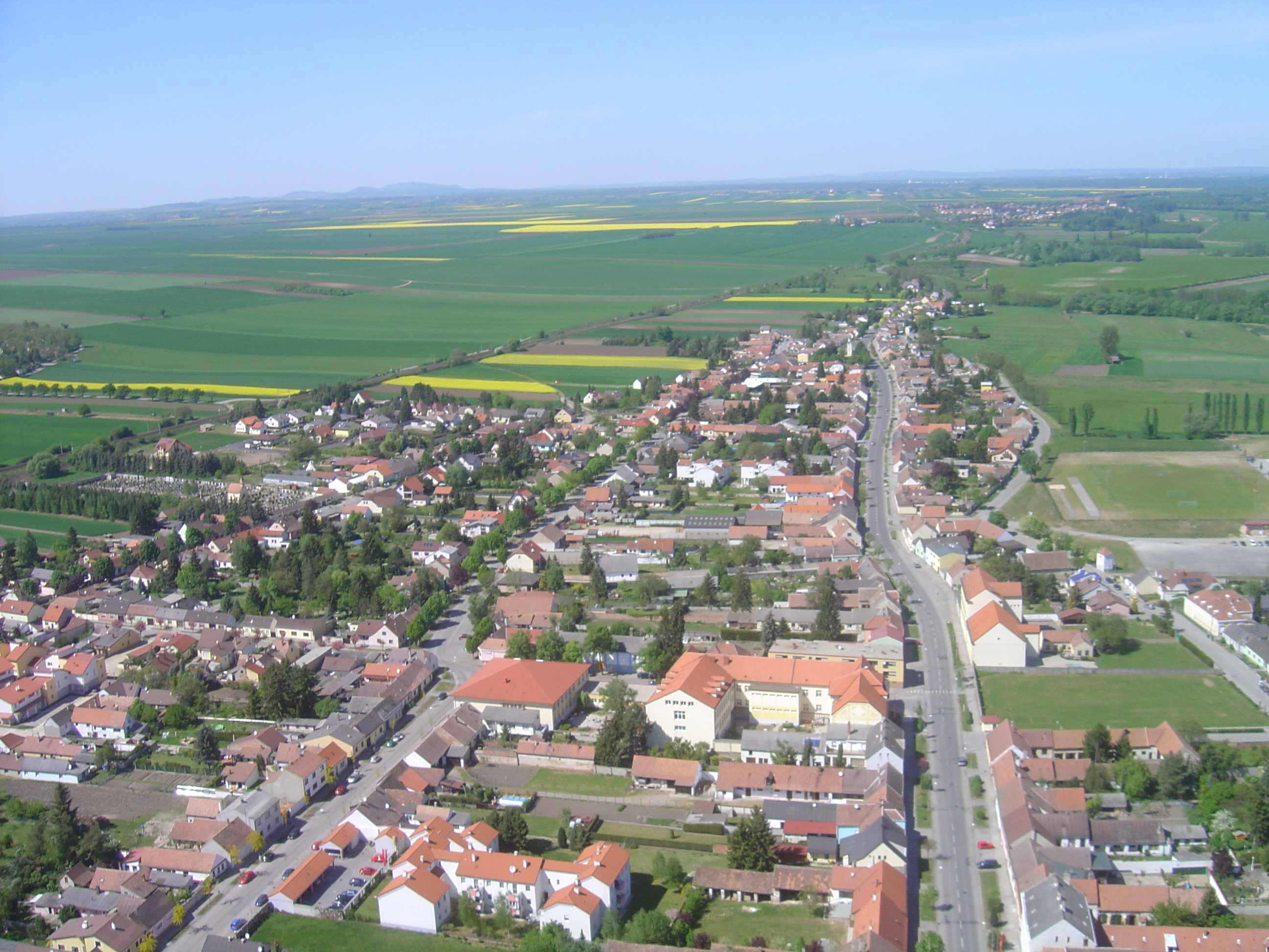 Hohenau an der March, Oberer Ort